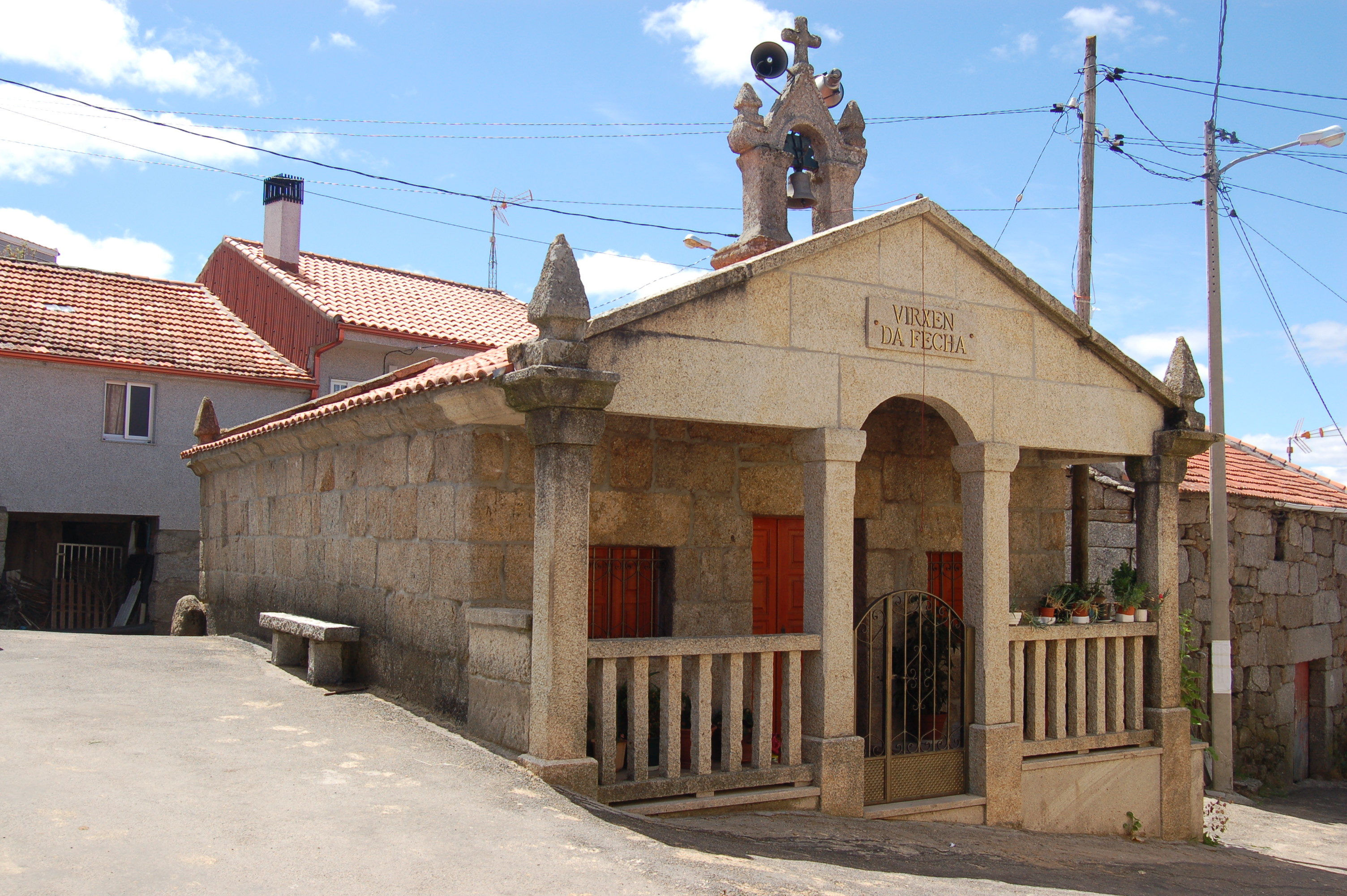 Capela da Virxe da Fecha en Requiás (Requiás, Muíños)